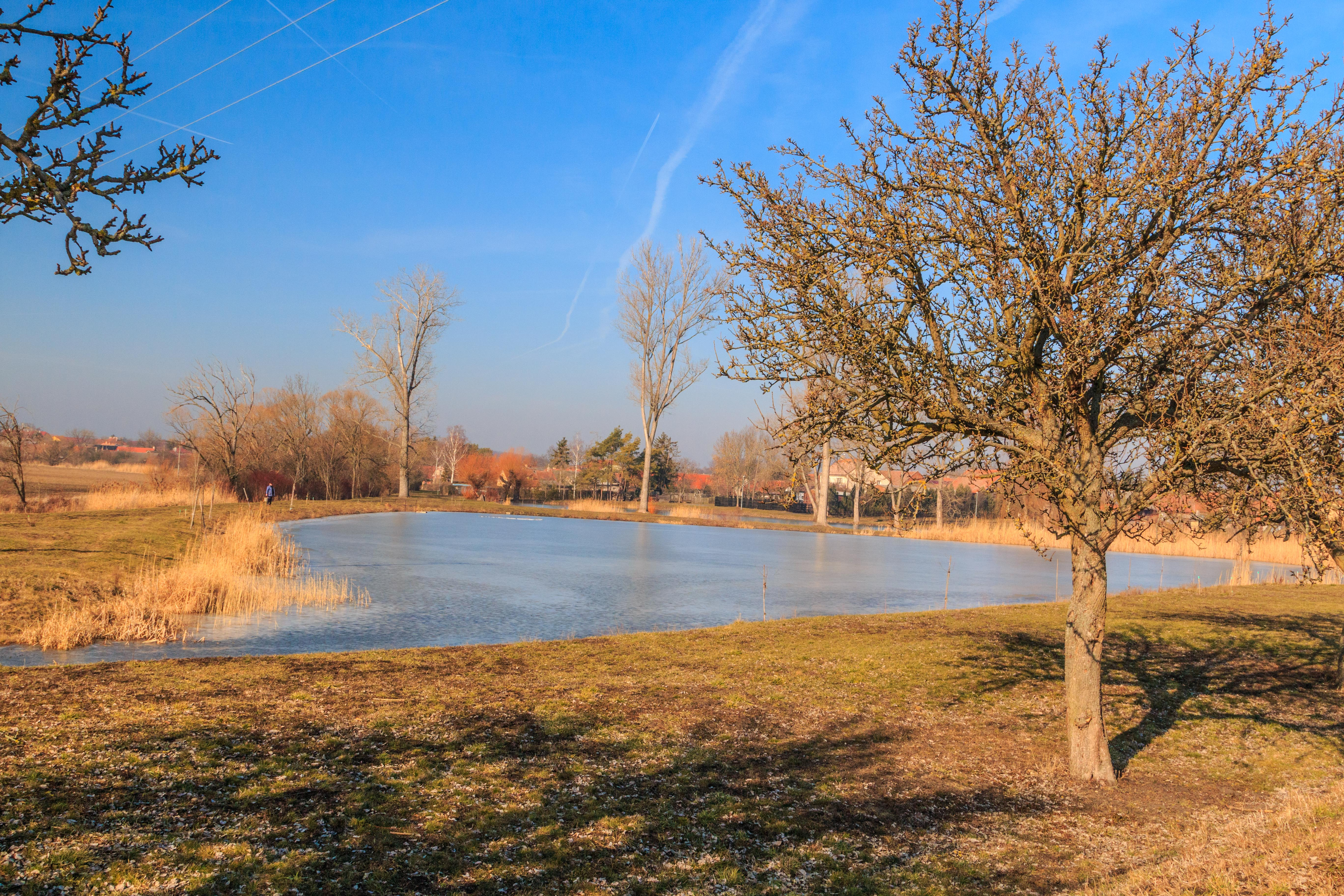 Pohled na rybníčky u Chotěšic Project: Vodstvo Ticket: 1711.